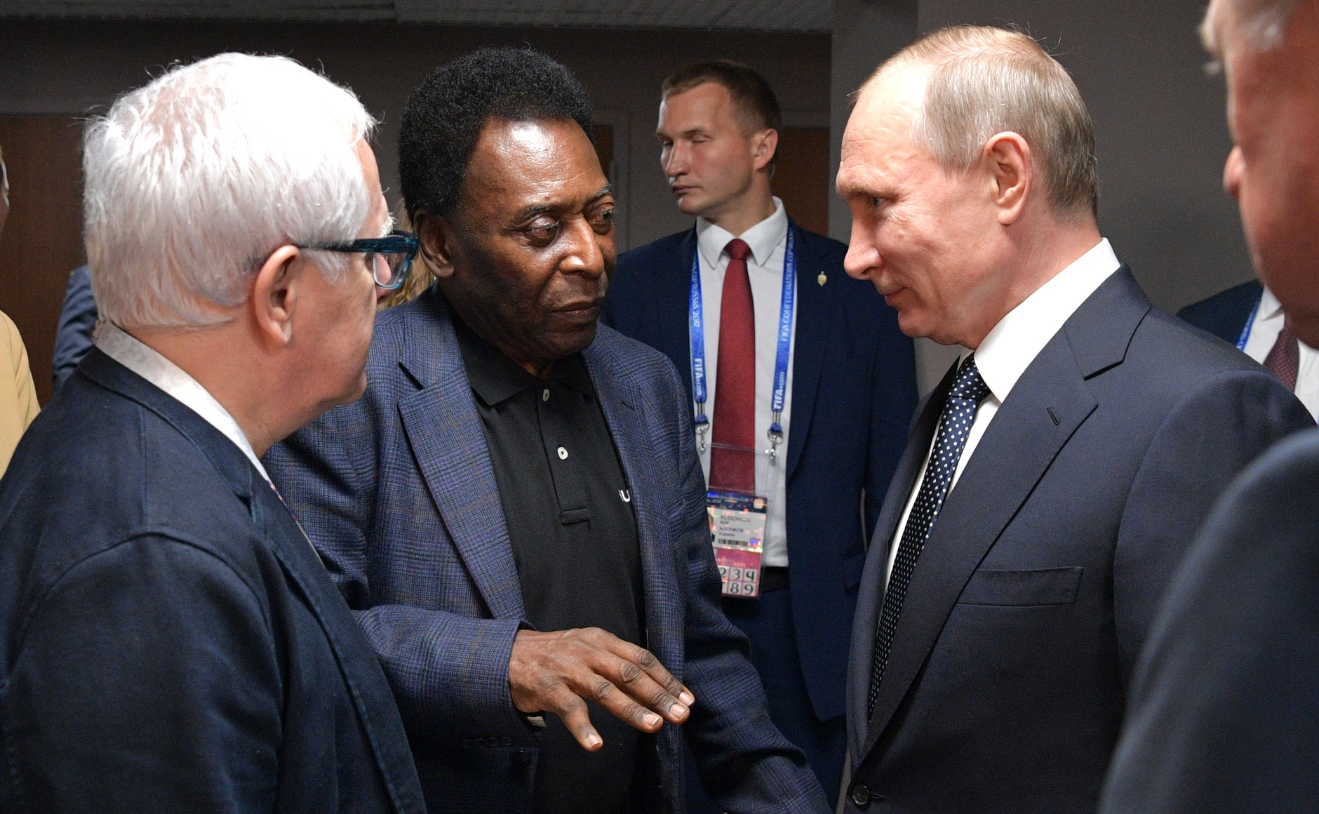 По окончании первого матча Кубка конфедераций 2017 года Владимир Путин побеседовал с легендарным бразильским футболистом Пеле